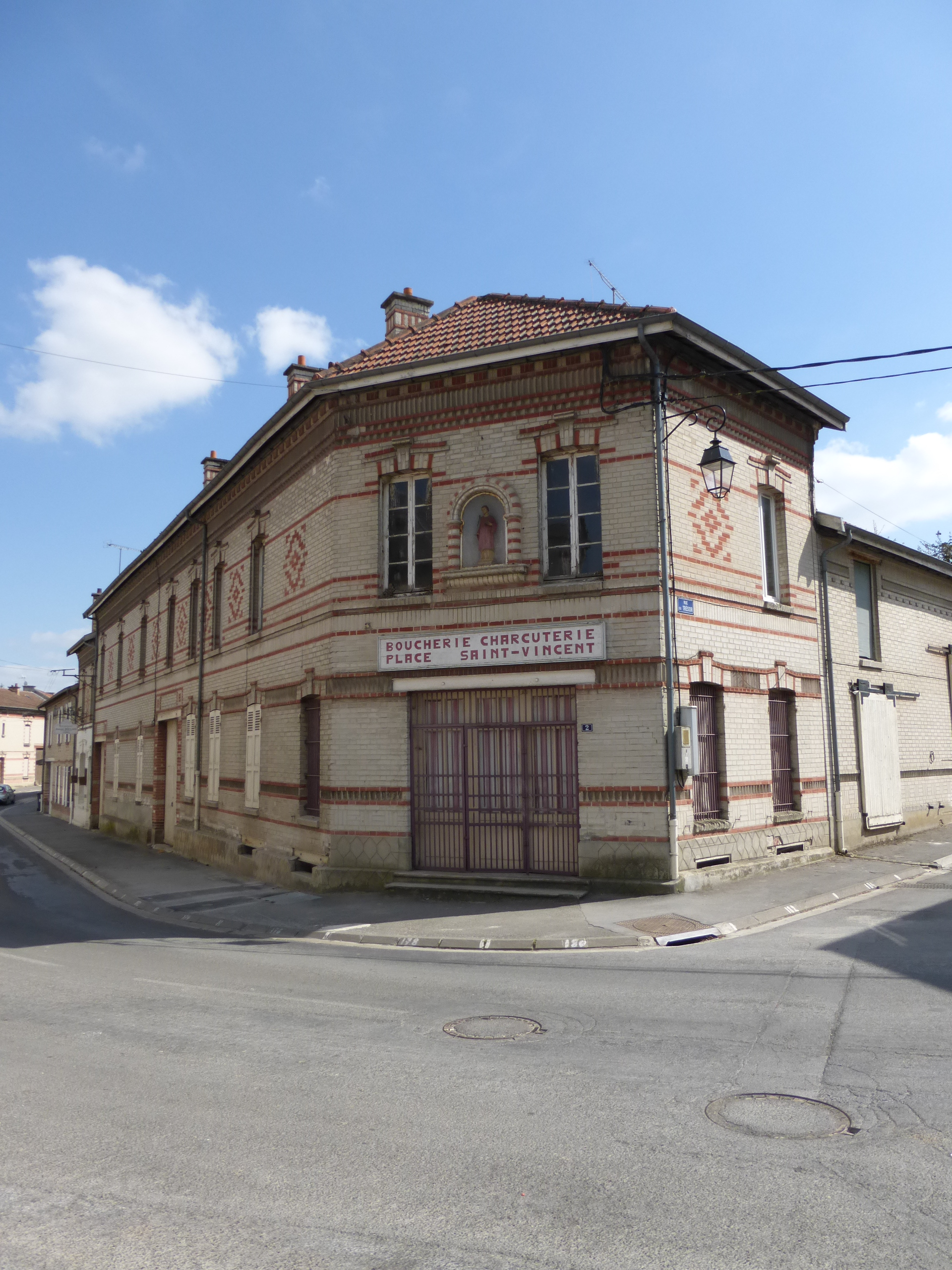 Cormicy - Architecture de la reconstruction - Roger Bouvard architecte - Boucherie Da Rocha - place St Vincent